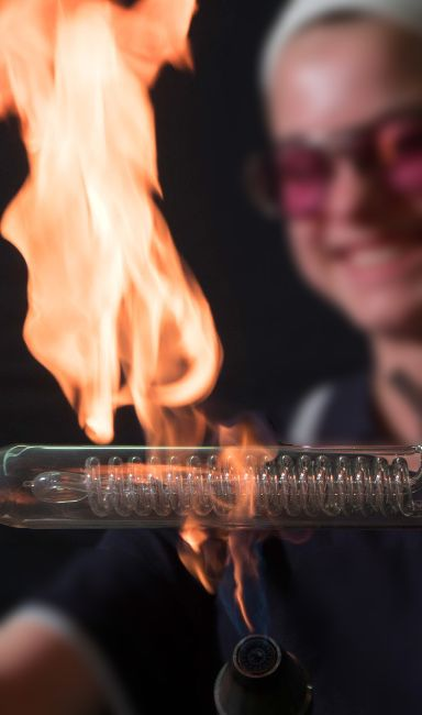 Apparateglasbläser/in EFZ